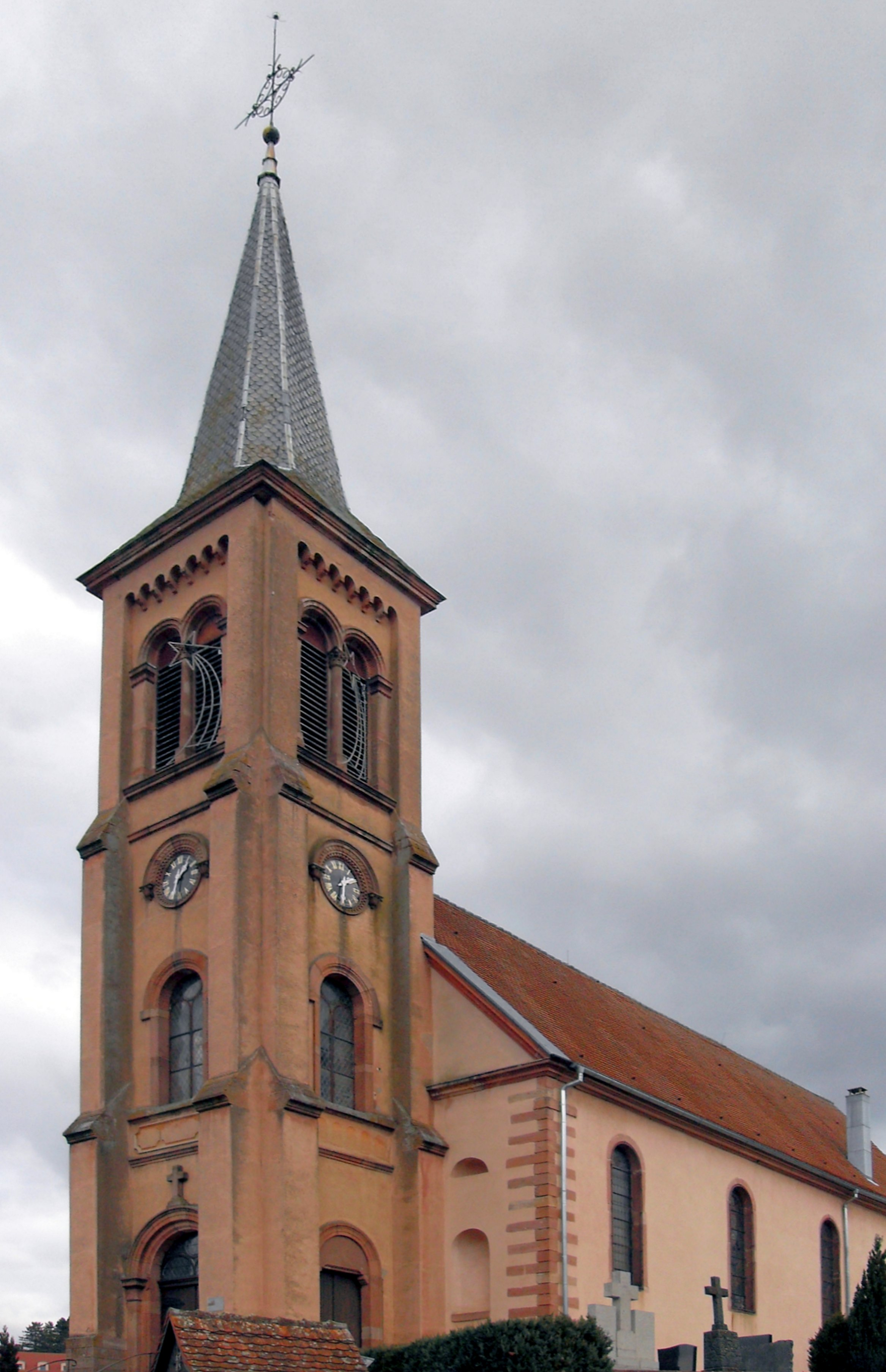 L'église Saint-Jean-Baptiste à Soultzbach-les-Bains